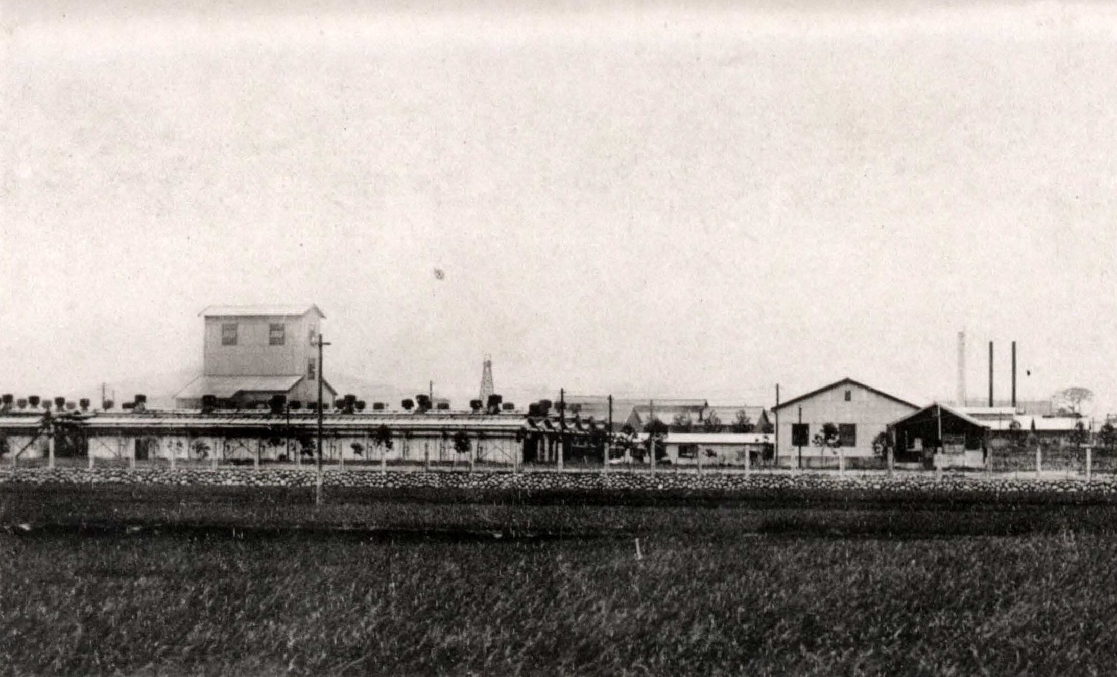 竹東油業所的鑿井、石油工場、煤炭工場和玻璃工場